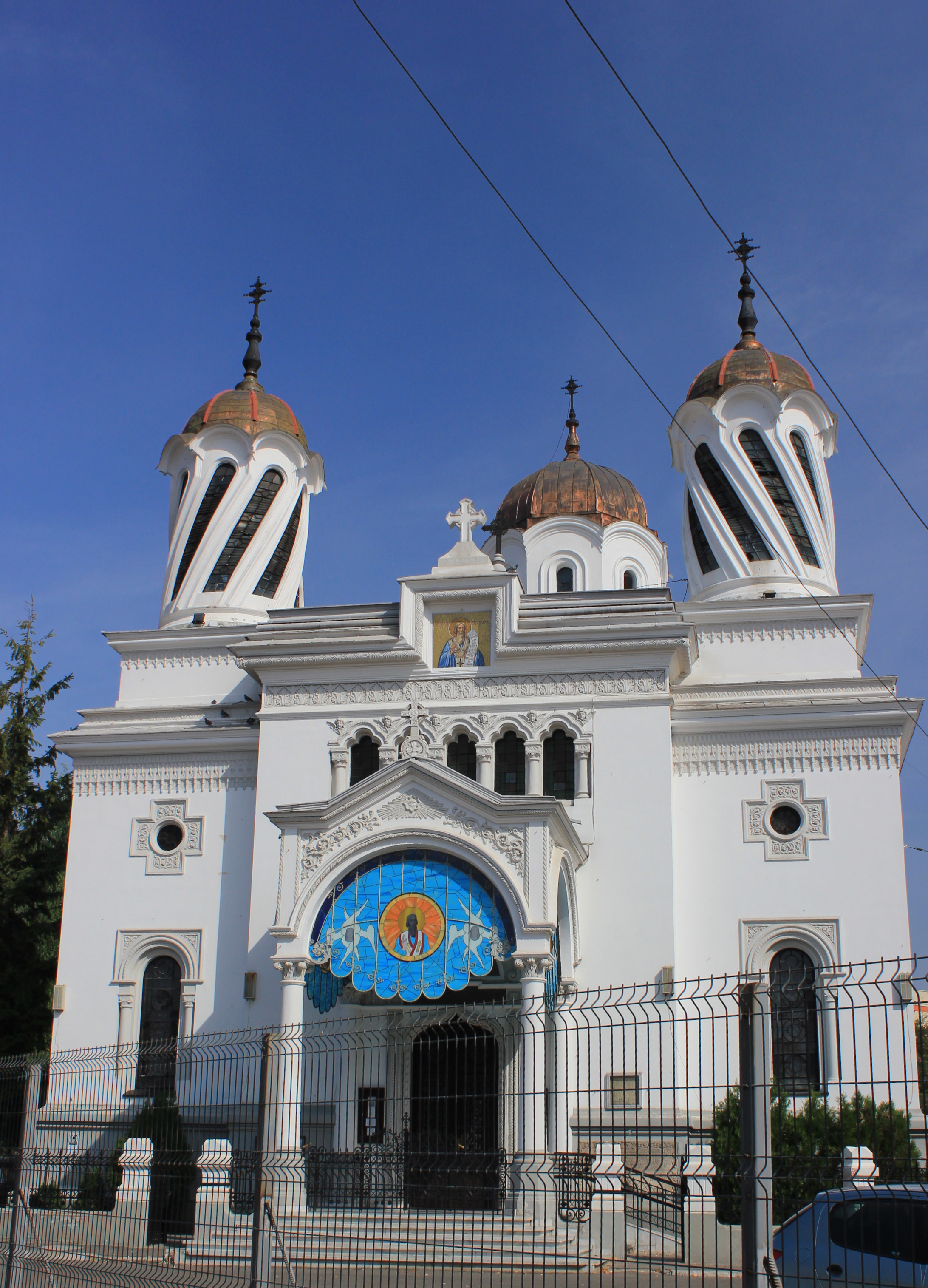 Biserica Sf Silvestru Episcopul Romei 01